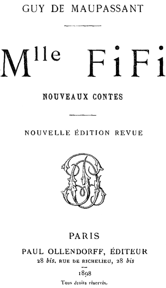 Mademoiselle Fifi by Guy de Maupassant (1850-1893)